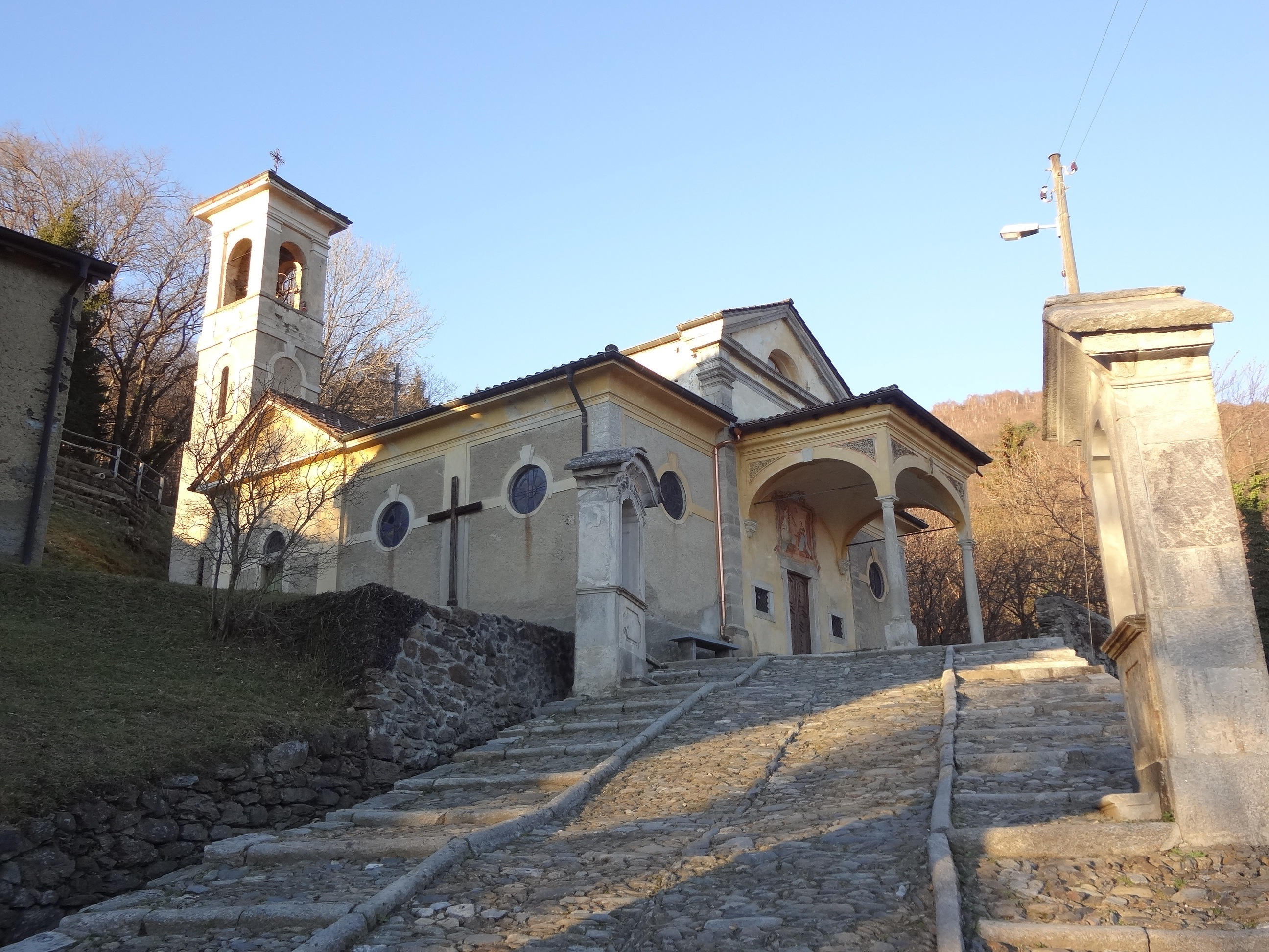 Oratorio Beata Vergine a Bidogno